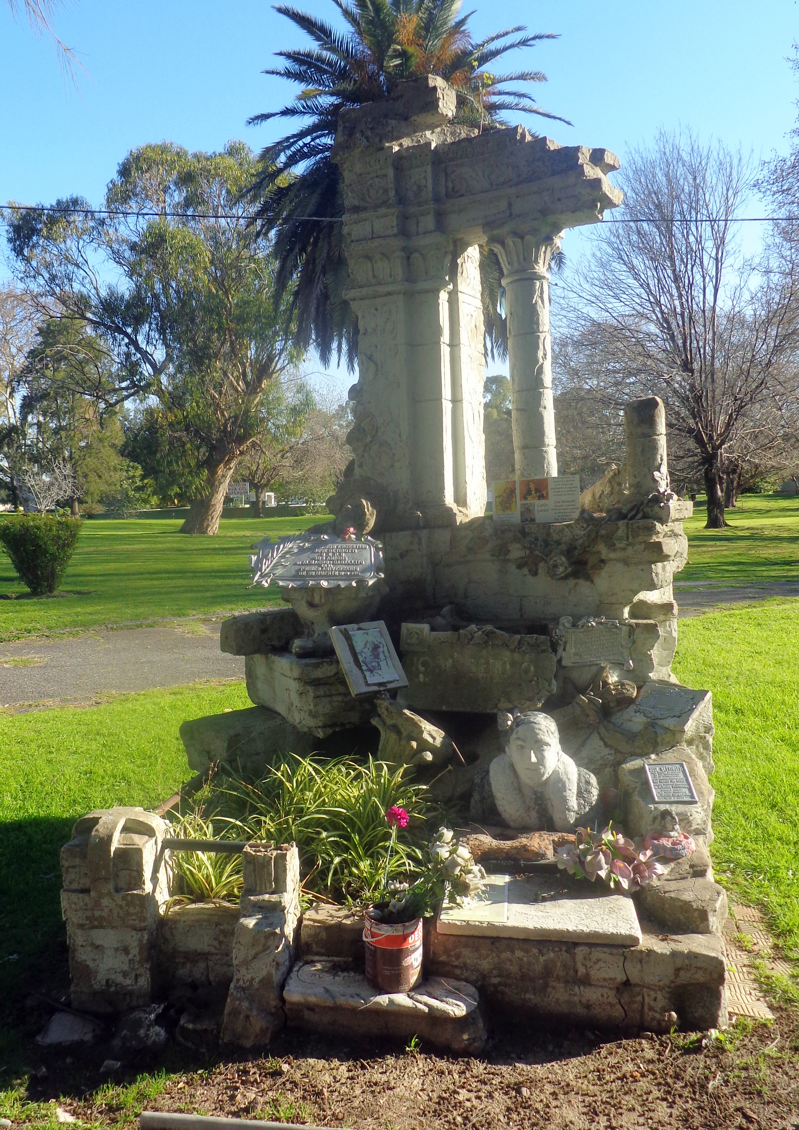 Monumento póstumo al payador José Betinotti en el Cementerio de la Cahacarita.